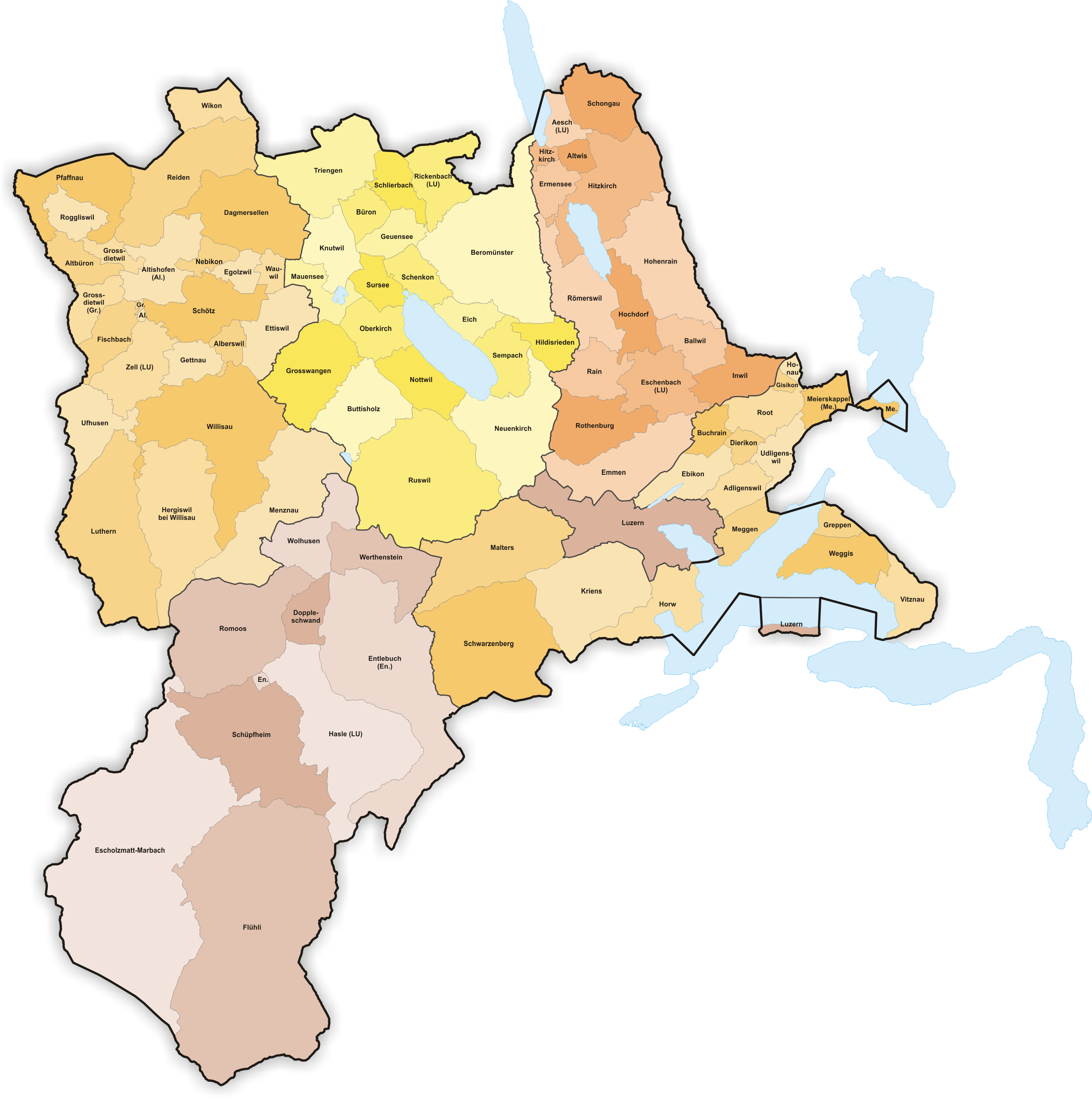 Municipalities in Canton Luzern